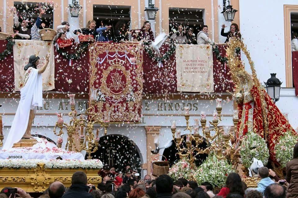 AUTO SACRAMENTAL DE LA RESURRECCIÓN HINOJOS